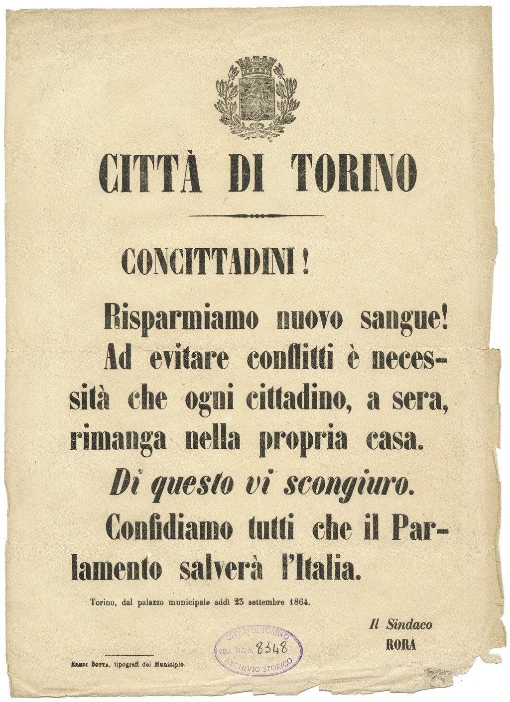 Proclama del sindaco Emanuele Luserna di Rorà in seguito agli incidenti del settembre 1864